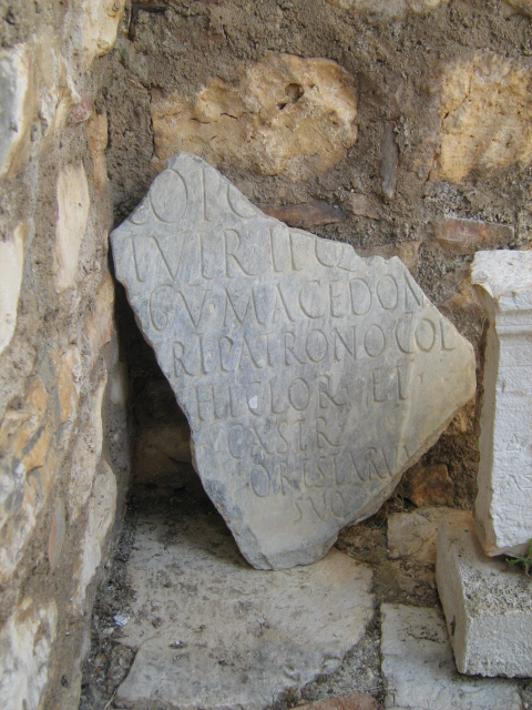 Артефакт во Бутринт, камена плоча на кое е запишано Macedonia.